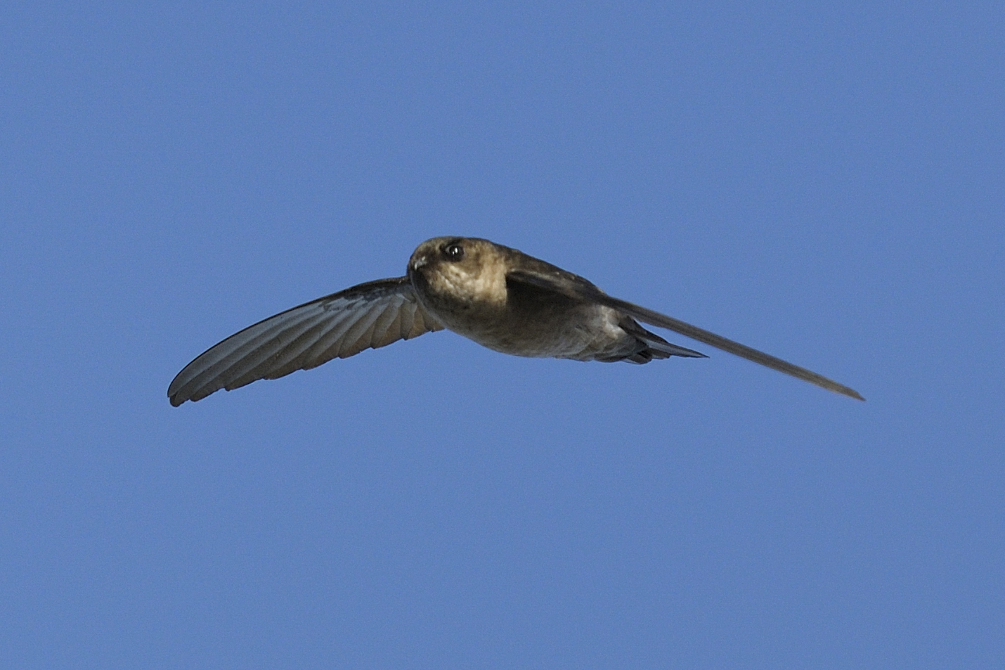 Mascarene Swiftlet (Aerodramus francicus) at La Possession, Arrondissement of Saint-Denis, Réunion